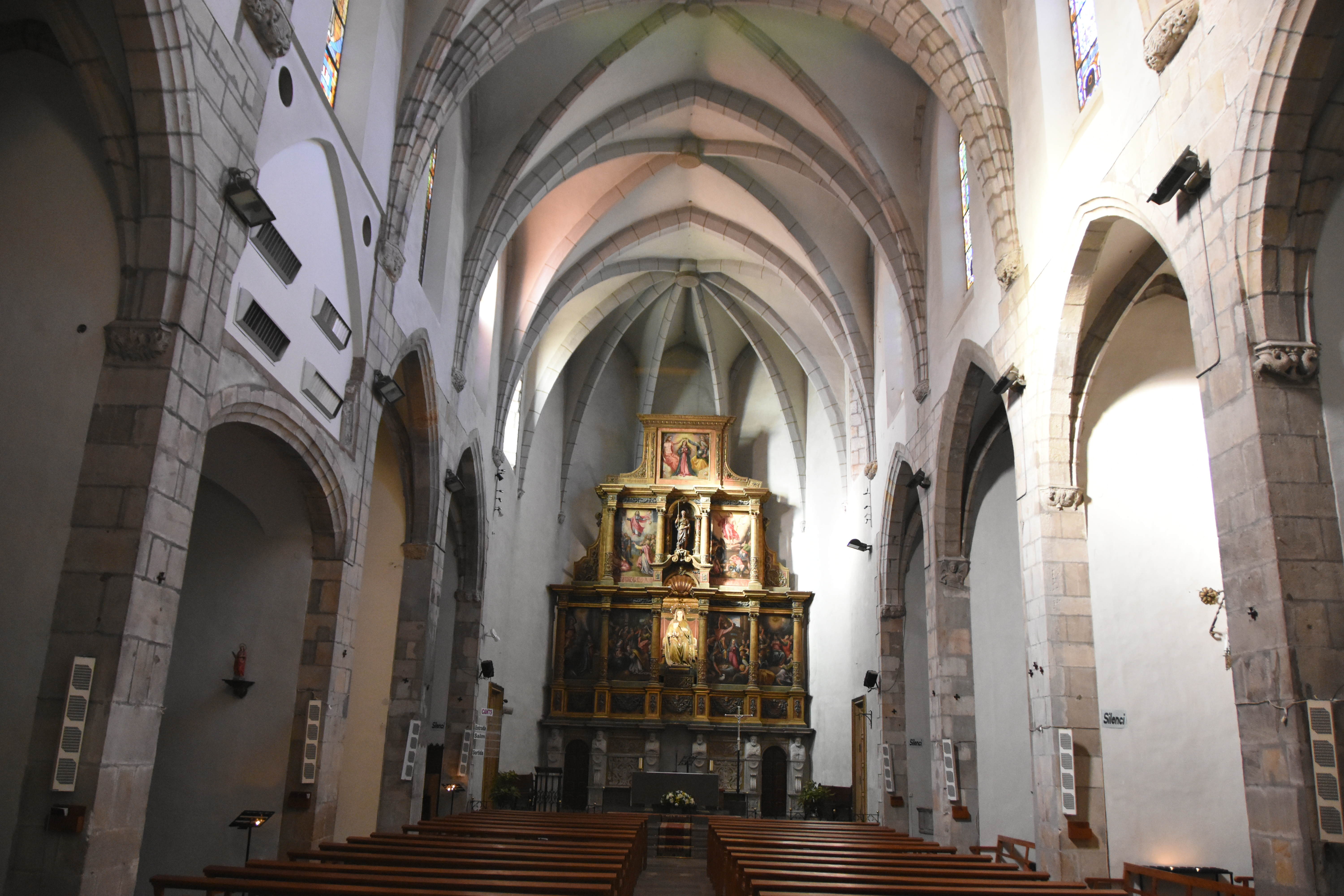 Interior amb el retaule major